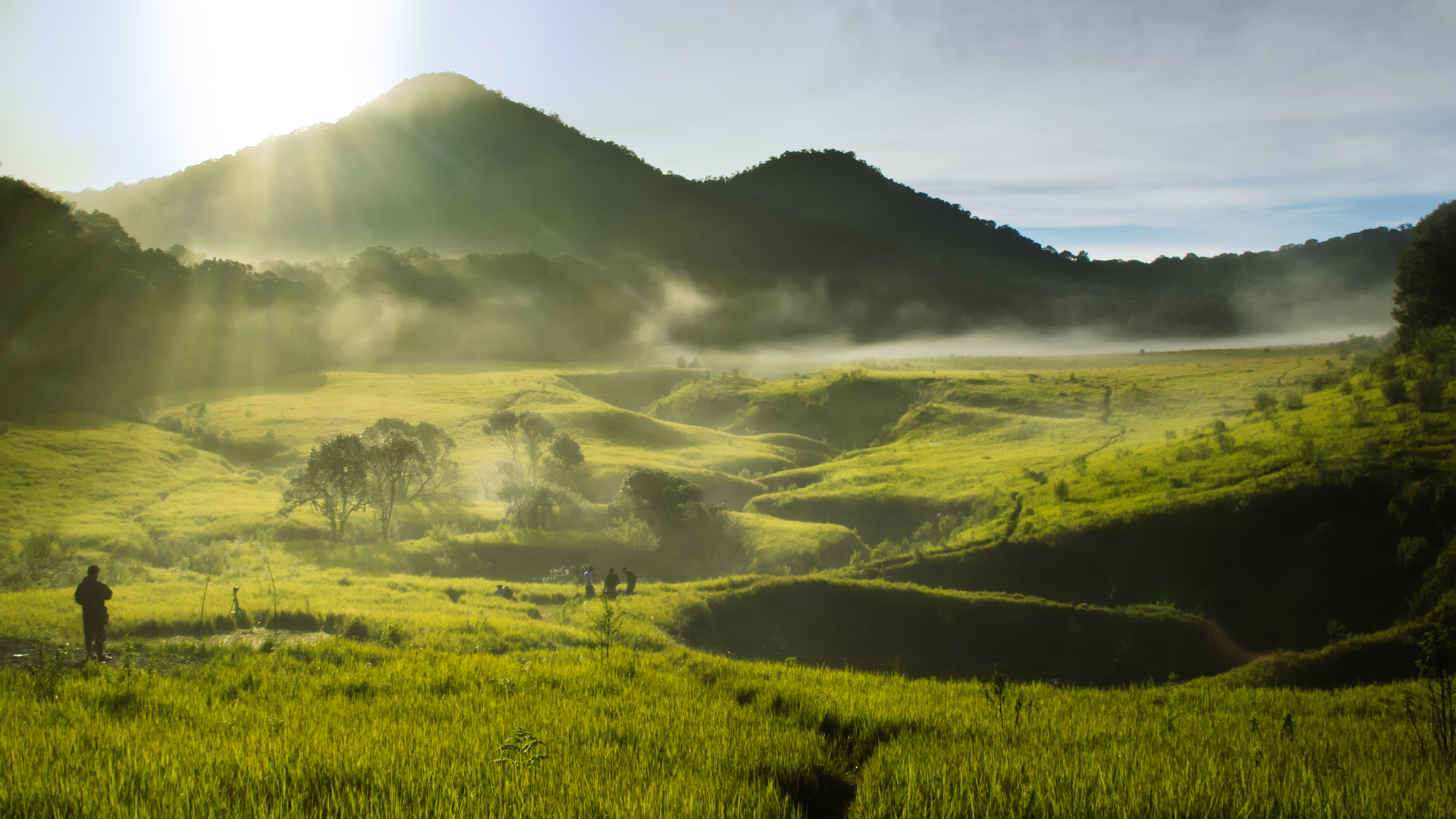 Tegal panjang adalah savana yang terletak di dataran tinggi gunung papandayan.. salah satu surga tersembunyi di sekitaran Gunung Papandayan, Kabupaten Garut, Jawa Barat